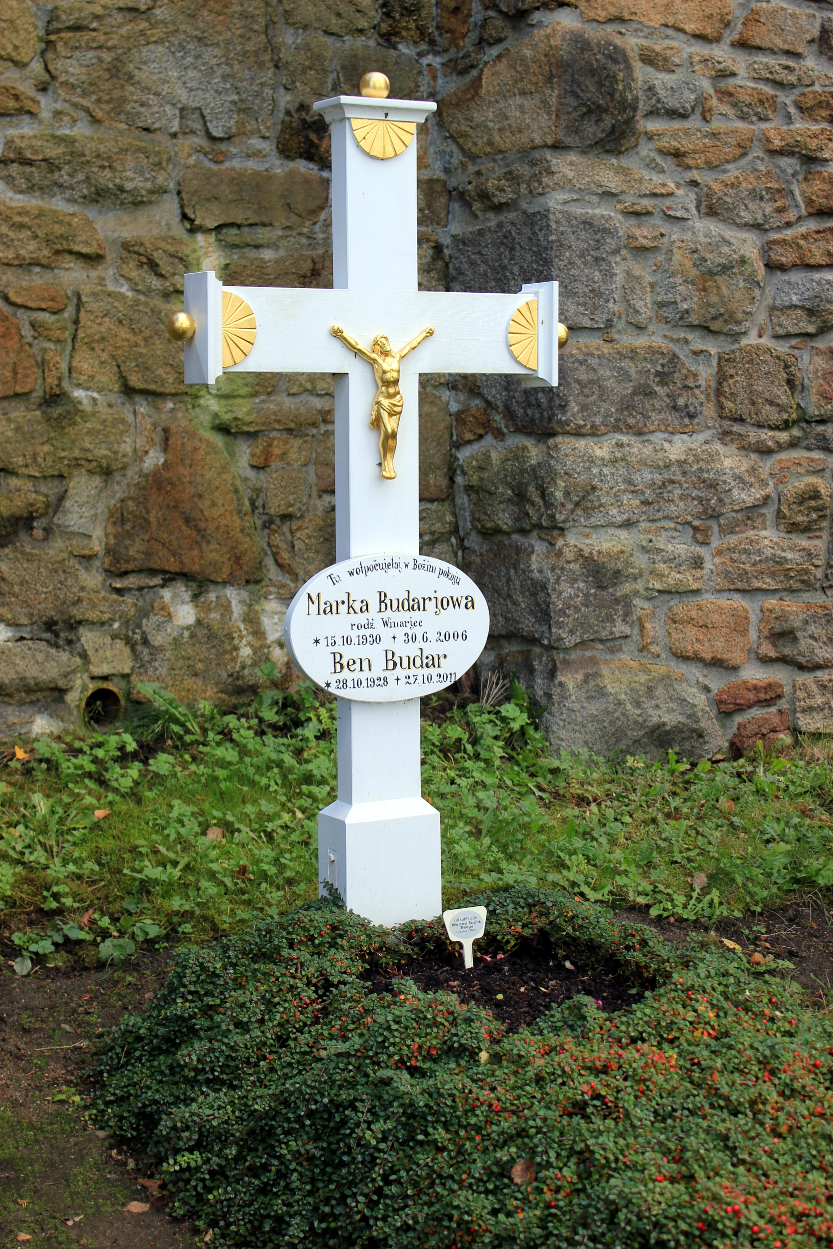 Hornjoserbsce: Row Bena Budarja na Budyskim Mikławšku.